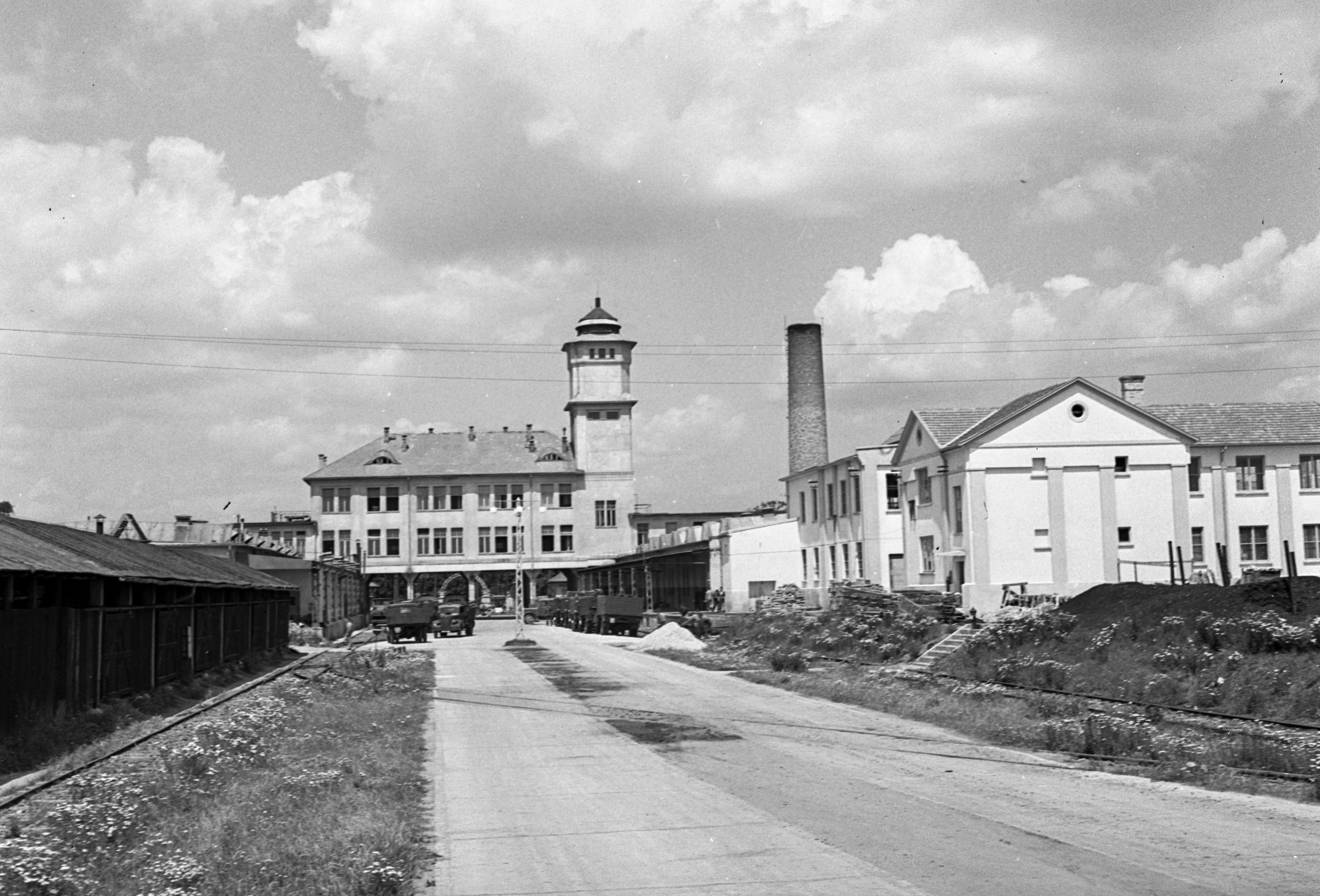 Mátyásföld, Újszász utca 41-43. Magyar Királyi Honvéd gépkocsiszertár, udvar. Location: Hungary, Budapest XVI. Tags: military, Budapest Title: Mátyásföld, Újszász utca 41-43. Magyar Királyi Honvéd gépkocsiszertár, udvar.